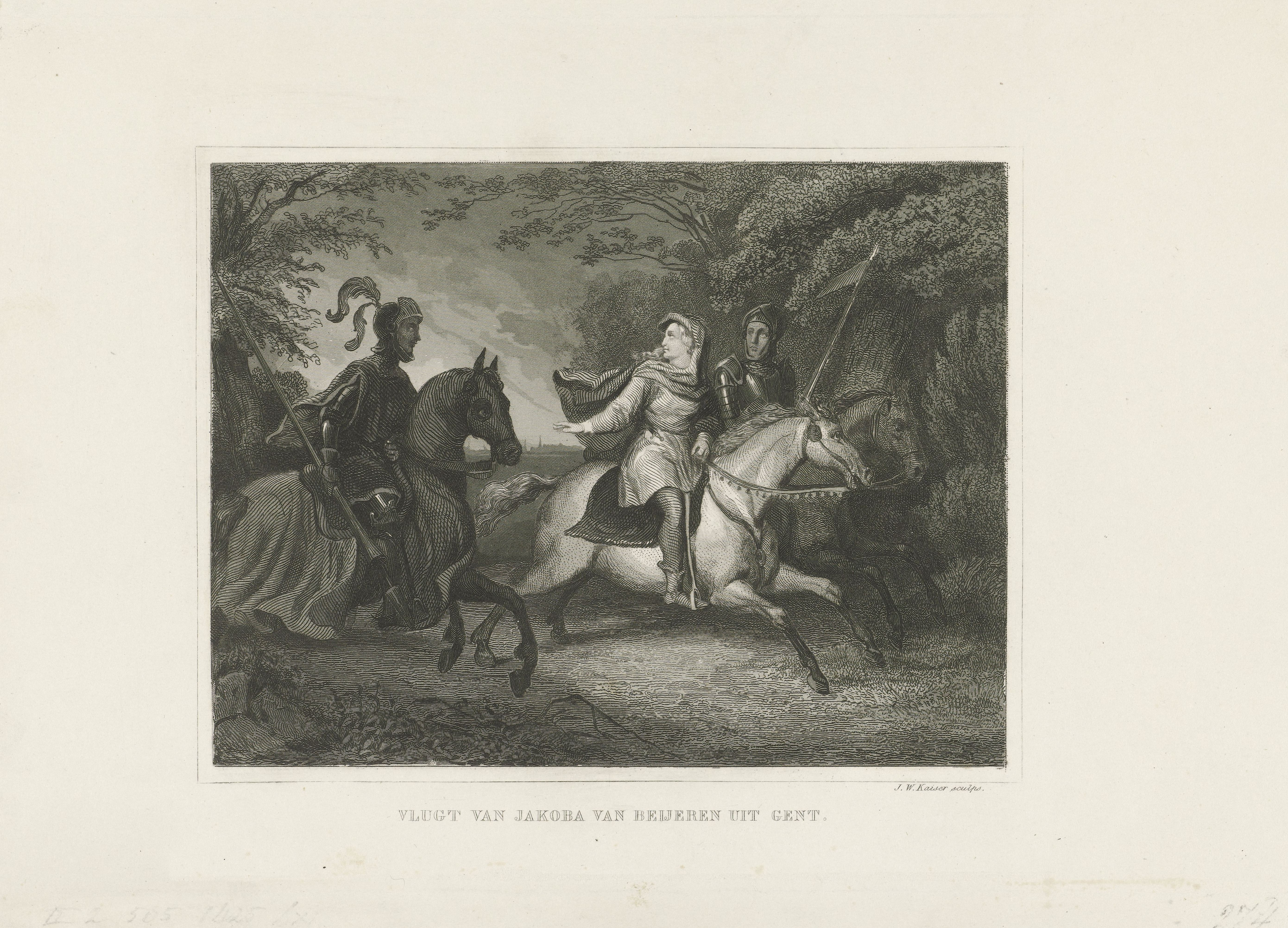 IdentificatieTitel(s): Vlucht van Jacoba van Beieren uit GentVlugt van Jakoba van Beijeren uit Gent (titel op object)Objecttype: prent boekillustratie Objectnummer: RP-P-1905-481Catalogusreferentie: FMH 276Opschriften / Merken: verzamelaarsmerk, verso, gestempeld: Lugt 2228Omschrijving: Jacoba van Beieren, gravin van Holland, Zeeland en Henegouwen, vlucht in het jaar 1425 te paard uit Gent onder begeleiding van twee soldaten.VervaardigingVervaardiger: prentmaker: Johann Wilhelm Kaiser (I) (vermeld op object)Datering: 1840 - 1884Fysieke kenmerken: staalgravure en papierMateriaal: papier Techniek: staalgravureAfmetingen: blad: h 211 mm × b 292 mmToelichtingIllustratie in: Arend, Johannes Pieter. Algemeene geschiedenis des vaderlands van de vroegste tijden tot op heden. 5 delen, Amsterdam: Schleijer, J.F. 1840-1884, dl 2.2, p. 504.OnderwerpWat: Hoekse en Kabeljauwse twistenWanneer: 1425 - 1425Wie: Jacoba van Beieren (gravin van Holland, Zeeland en Henegouwen)Verwerving en rechtenCredit line: Schenking van mevrouw Brandt, Amsterdam en mevrouw Brandt, AmsterdamVerwerving: schenking 1905Copyright: Publiek domein